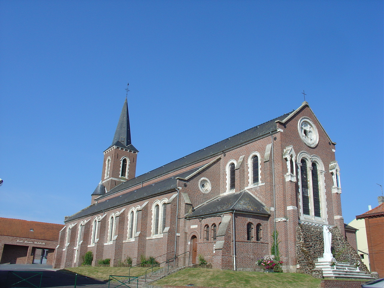 Église de Burbure